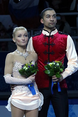 Алена Савченко и Робин Шолковы на цветочной церемонии Зимних Олимпийских игр 2014 в Сочи